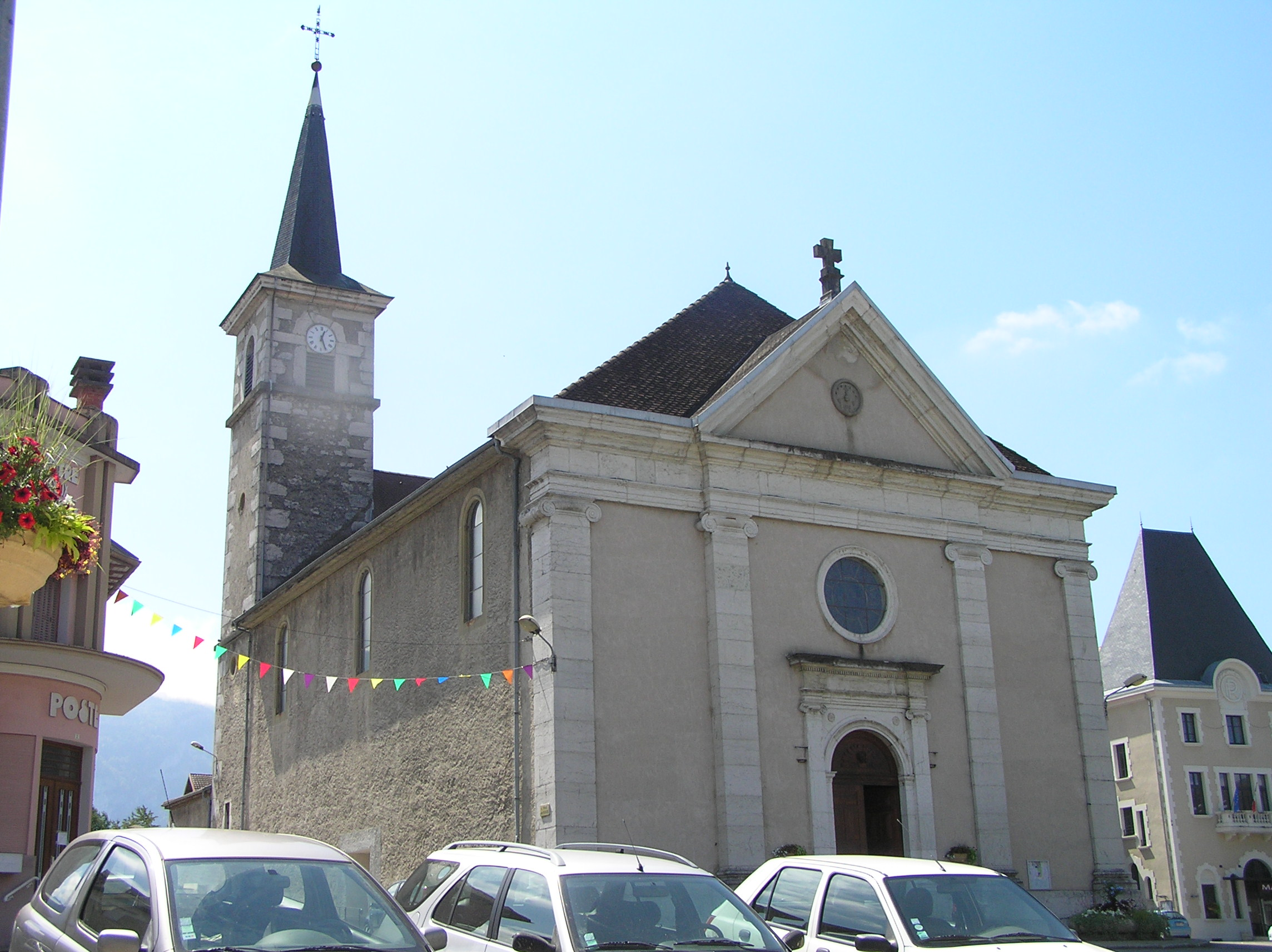 église de Entre-deux-Guiers, Isère, France